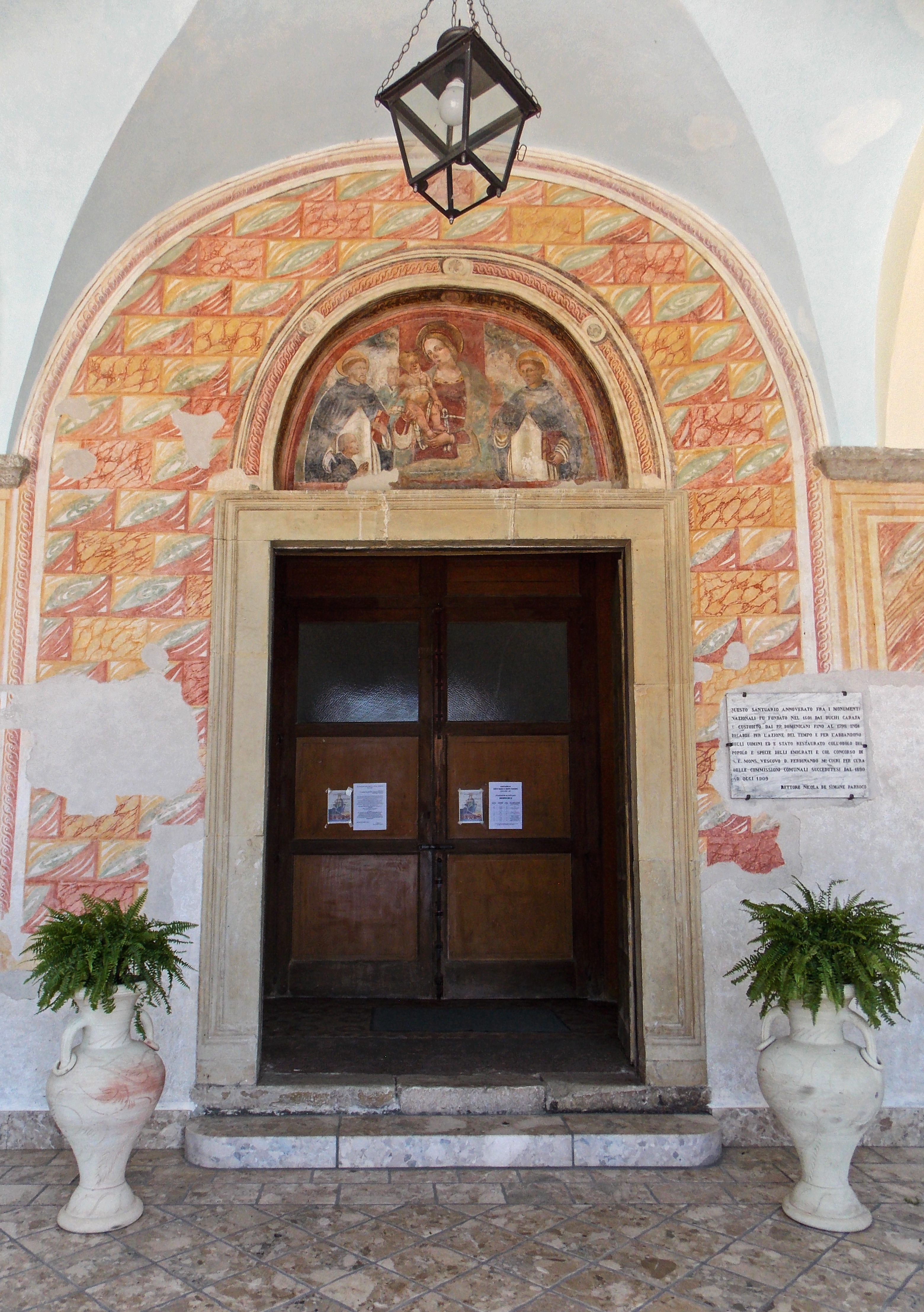 Il santuario della Madonna del Taburno a Bucciano (BN)